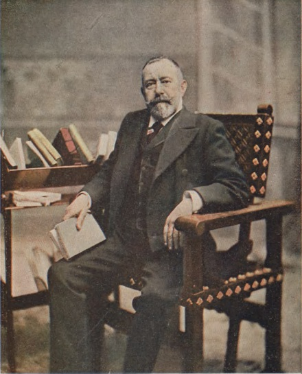 Eugenio Sellés; fotografía de Kaulak